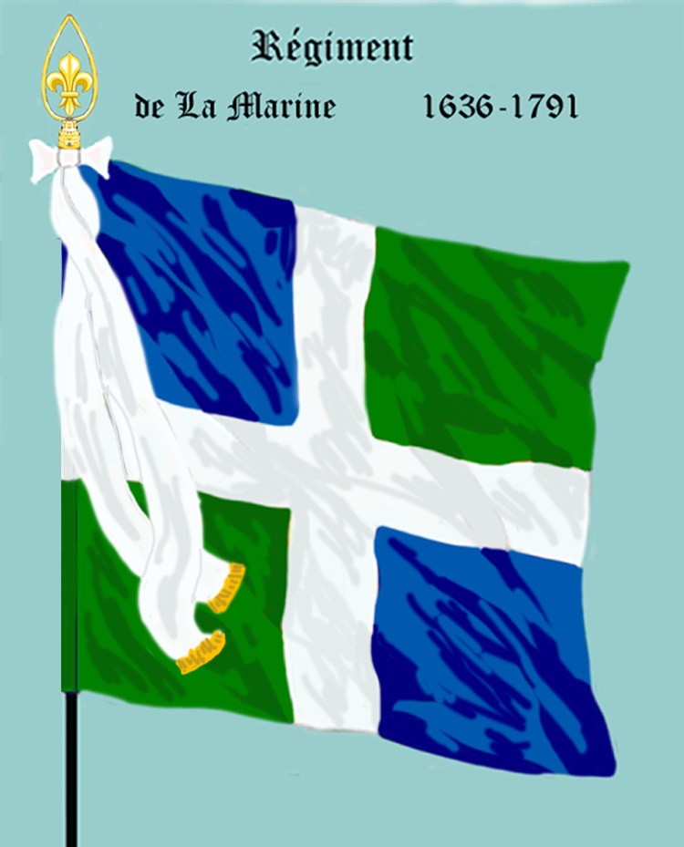 Ordonnanzfahne eines königlich französischen Infanterie-Regiments. - Entnommen und überarbeitet aus: „LES UNIFORMES ET LES DRAPEAUX DE L'ARMÉE DU ROI“ Marseille 1899. (Drapeau d'ordonnance d' un régiment française d'infanterie royale.)